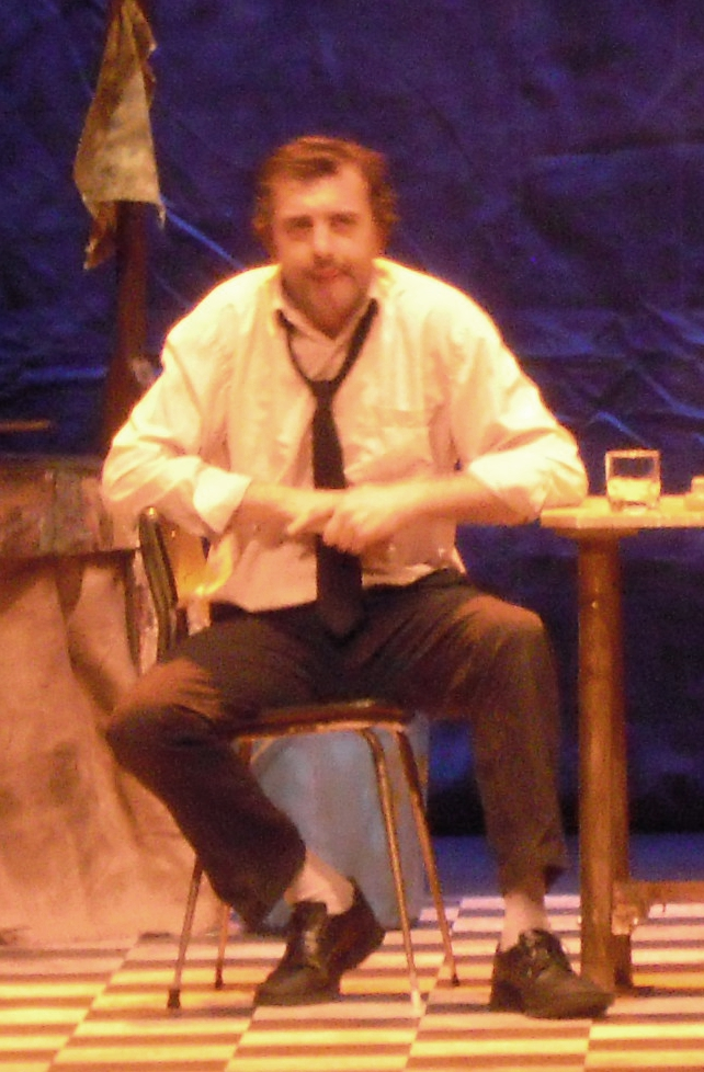 Evaristo Calvo na representación da obra Oeste solitario, no Pazo da Cultura de Pontevedra